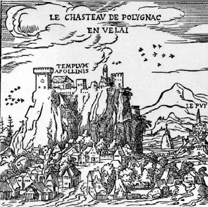 Gravure du milieu du XVIe siècle représentant le chateau de Polignac en Haute-Loire, prétendument construit sur un ancien temple d'Apollon / Mid-16th century engraving showing the castle of Polignac, Haute-Loire, allegedly built on a temple dedicated to Apollon.